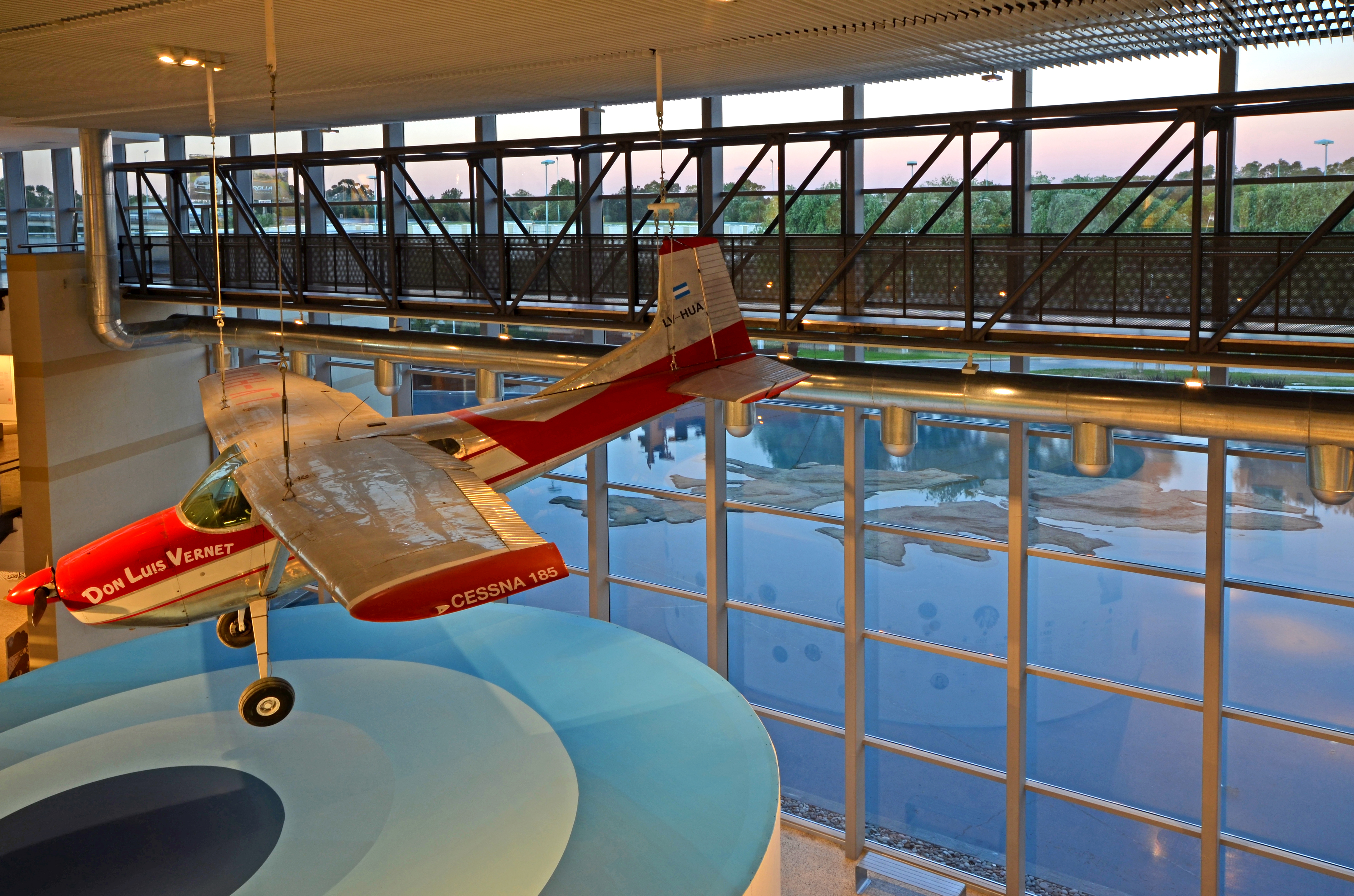 10 de diciembre de 2014.- Museo Malvinas e Islas del Atlántico Sur